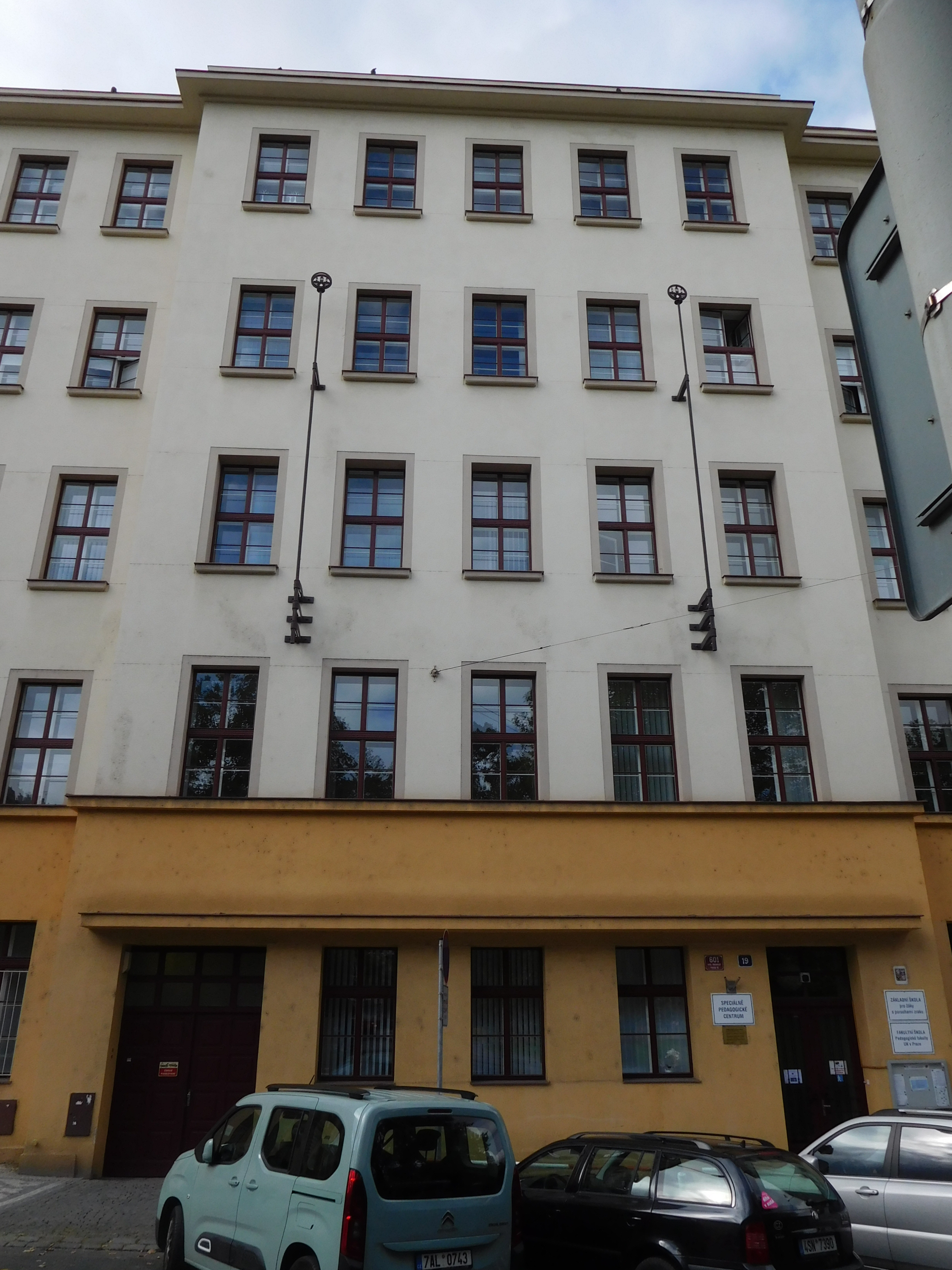 Praha - Vinohrady, Náměstí míru 19, Základní škola pro žáky s poruchami zraku